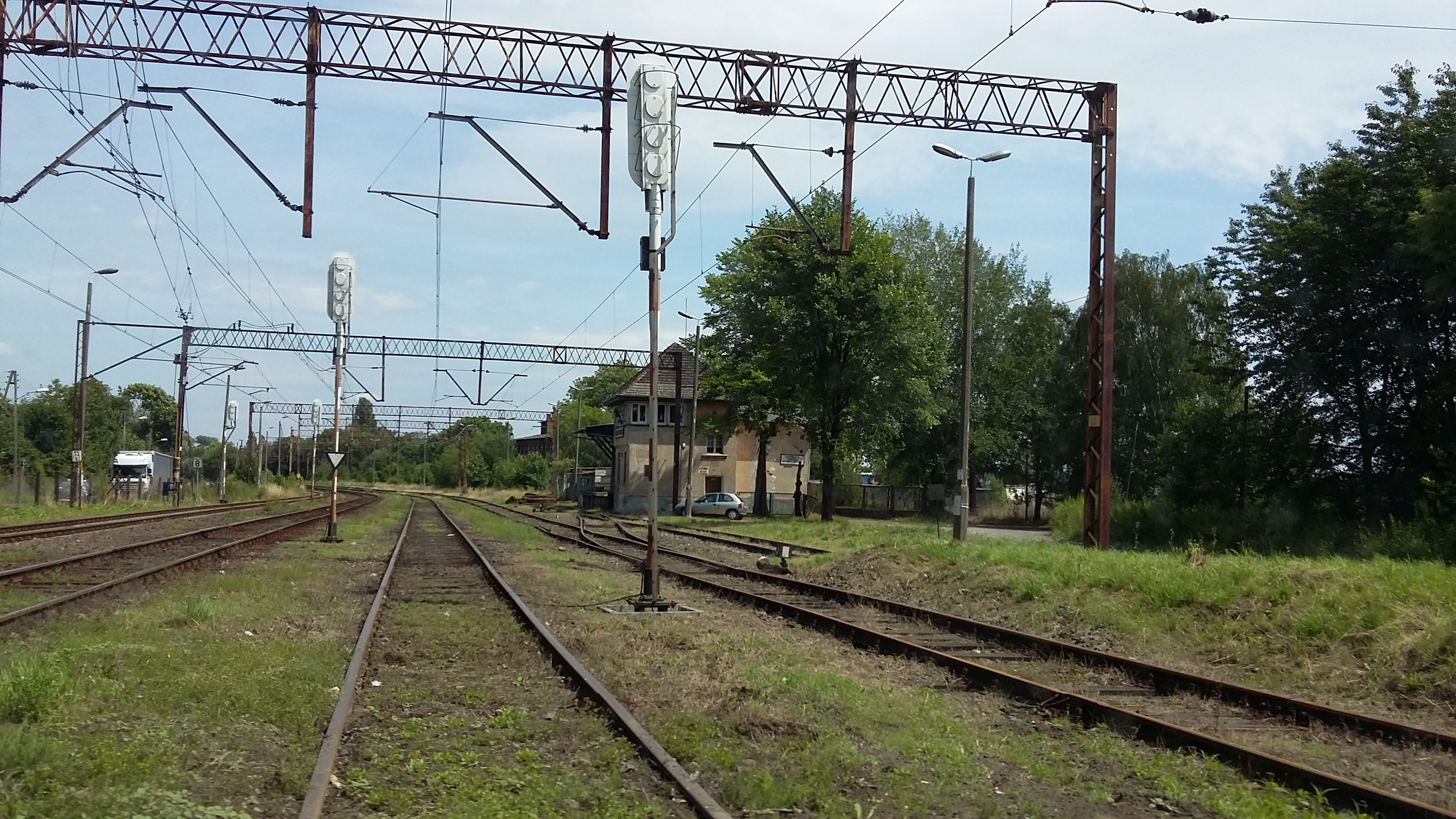 Linia kolejowa nr 406 w Szczecinie, nieopodal stacji Gocław